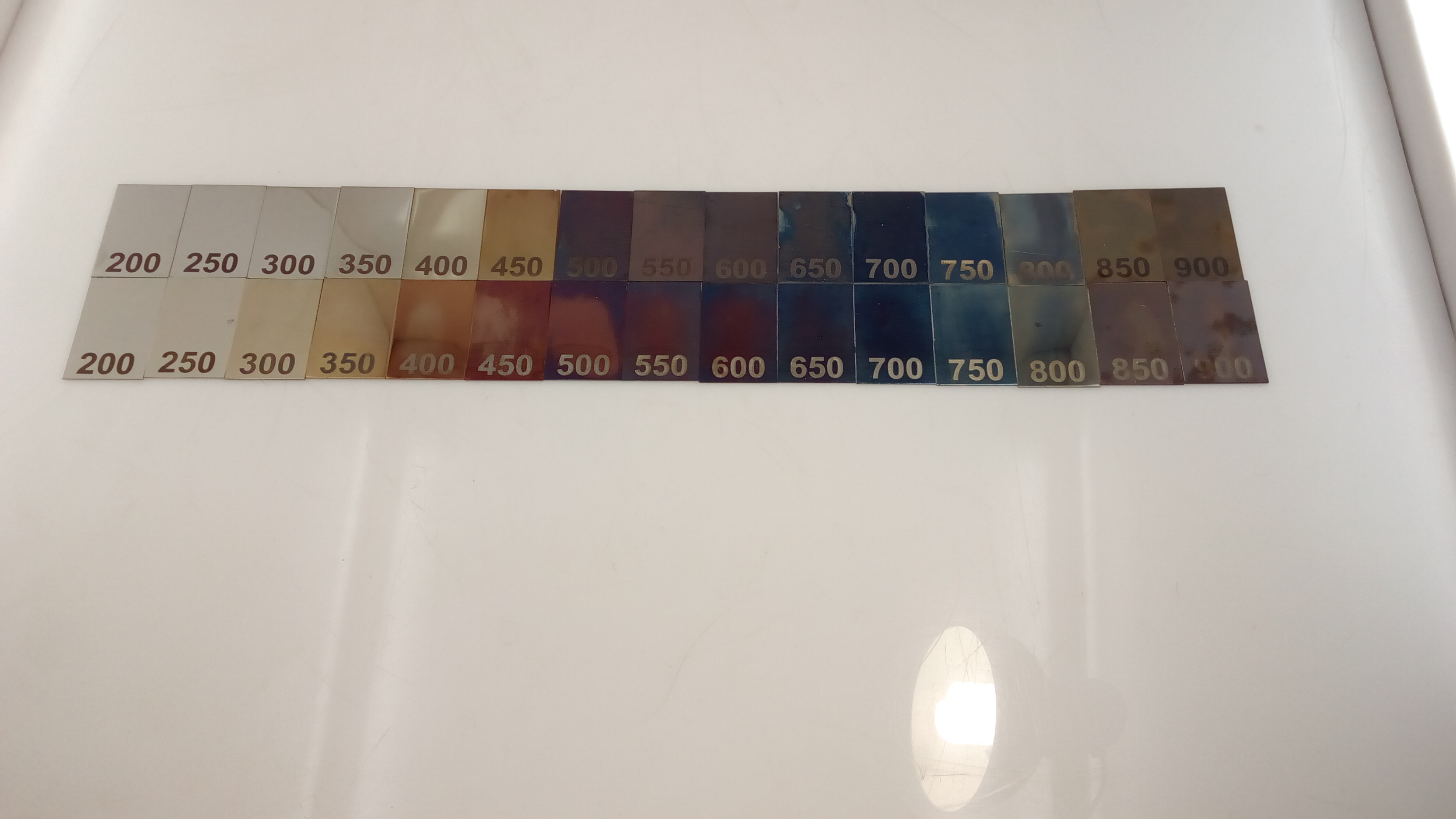 Цвета побежалости нержавеющей стали 12Х17(AISI 430) Температура в градусах Цельсия указана на образцах Толщина металла - 0,5(сверху) 0,8(снизу) Срок выдержки - 15 минут Искусственное освещение